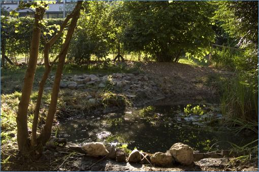 Schulteich des Gymnasium Kreuzgasse